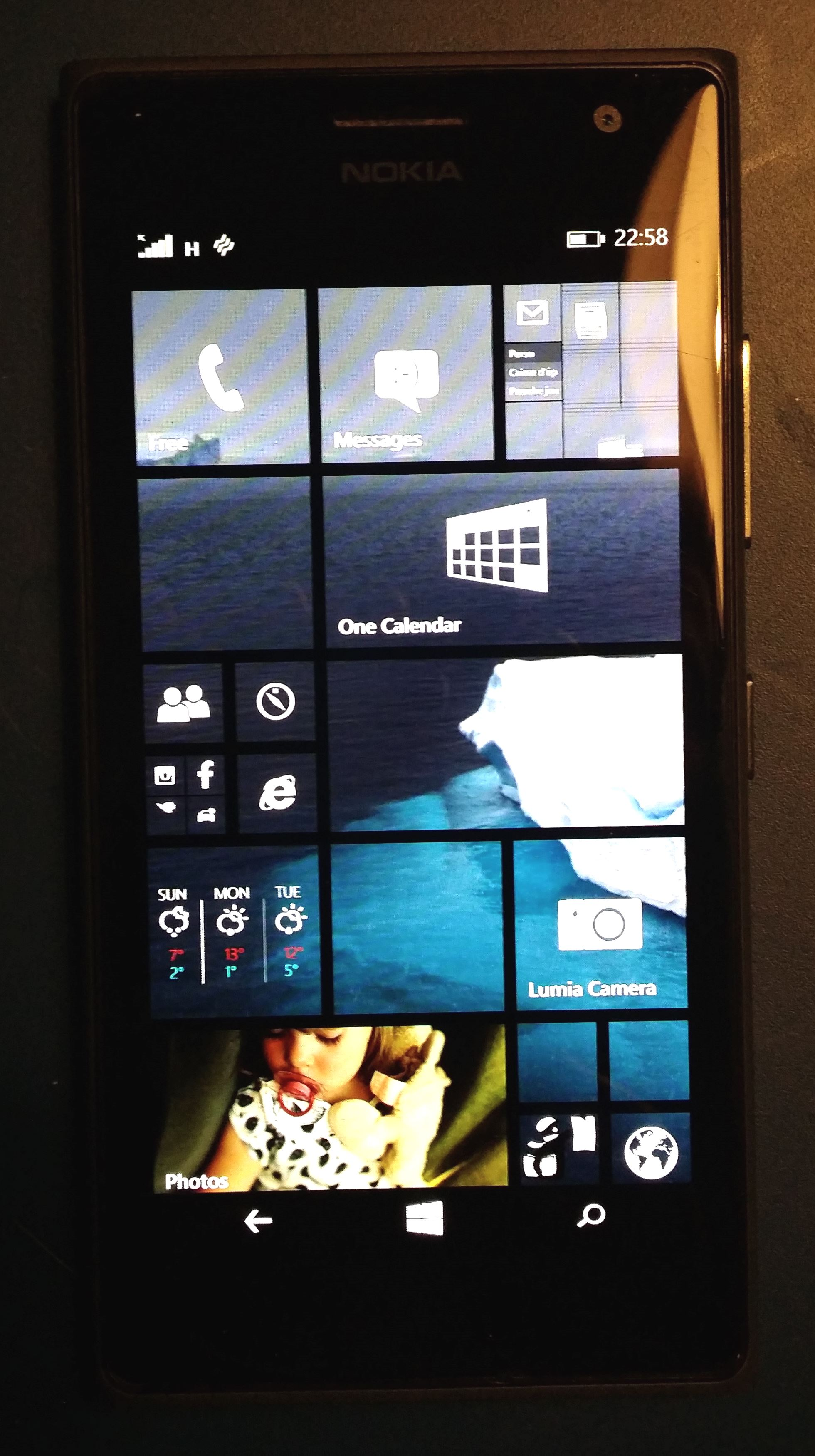 Smartphone Nokia Lumia 735